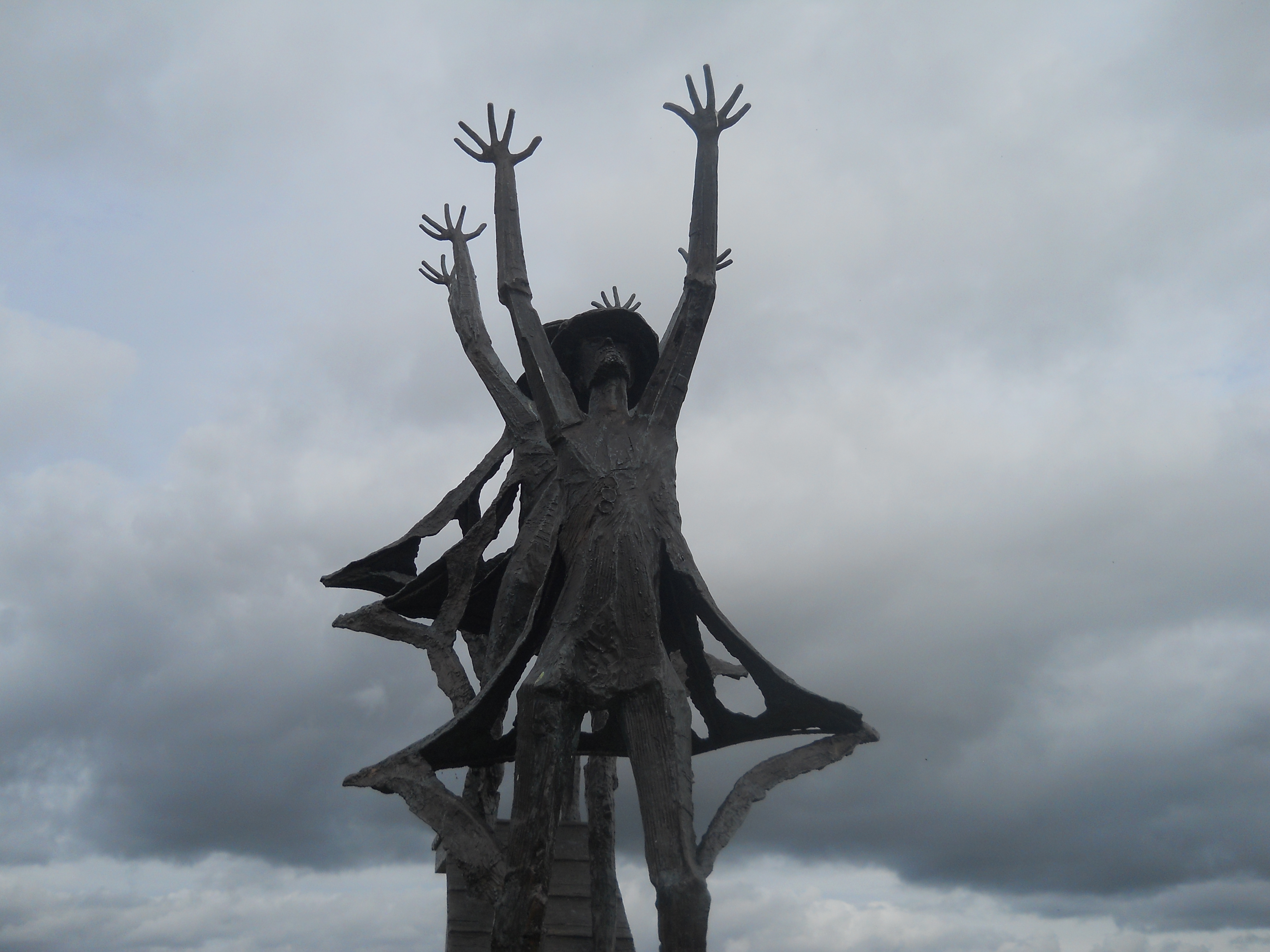 Dealbhóireacht ag Ráth Maoláin, Co. Dhún na nGall, le Teitheadh na nIarlaí a chomóradh.